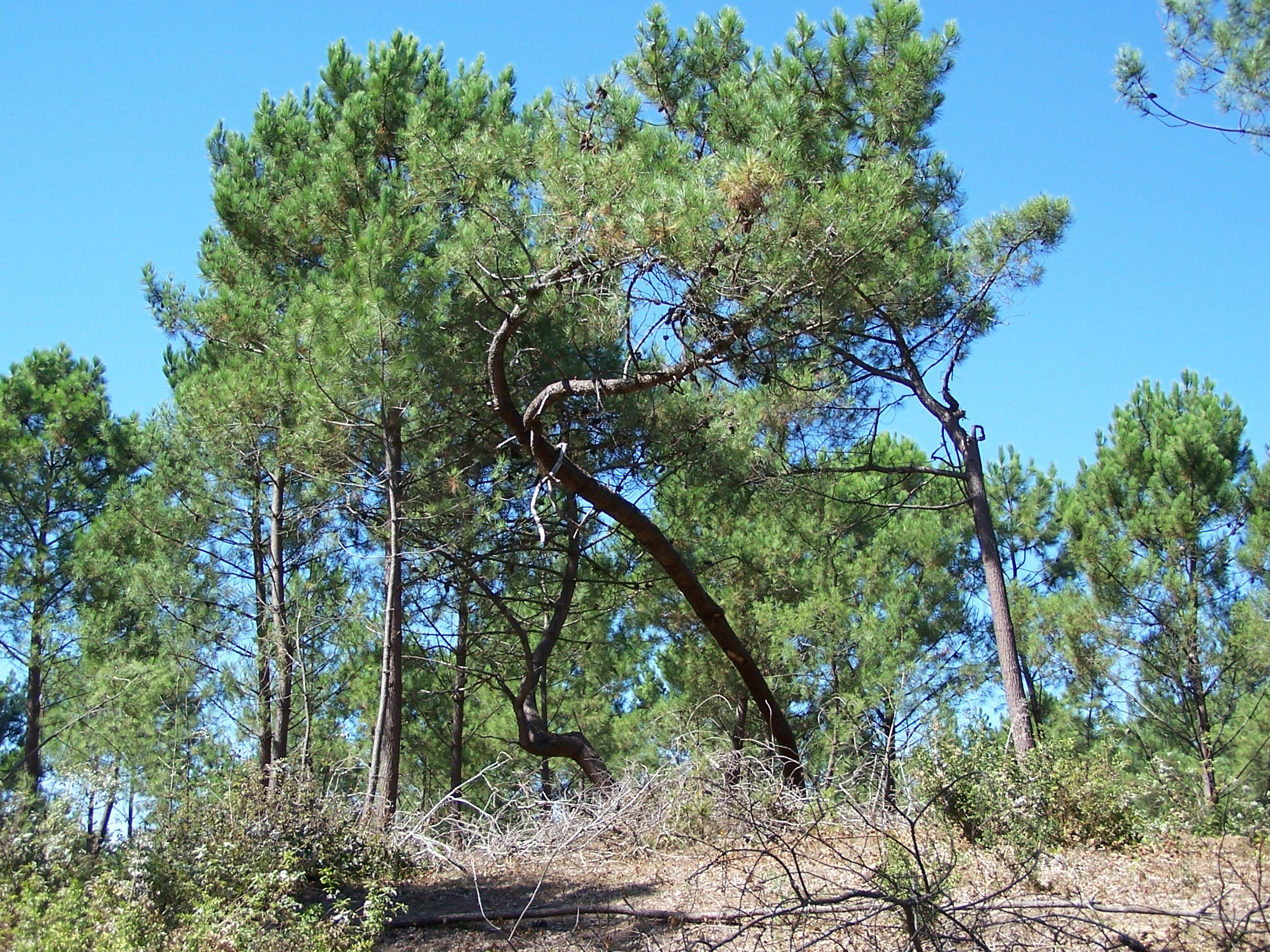 Photographie prise dans la forêt de la Coubre, une forêt domaniale couvrant plus de 4 277 hectares en bordure du littoral de la presqu'île d'Arvert, en Charente-Maritime, sur les communes des Mathes et de La Tremblade. C'est une forêt de pins maritimes, de chênes verts, de chênes pédonculé et d'arbousiers qui a été plantée au début du XIXe siècle pour contenir l'avancée des sables et protéger le site des érosions éolienne et marine très actives. Classée forêt littorale de protection, elle abrite une faune variée comportant notamment des cerfs élaphes, des chevreuils et des sangliers.